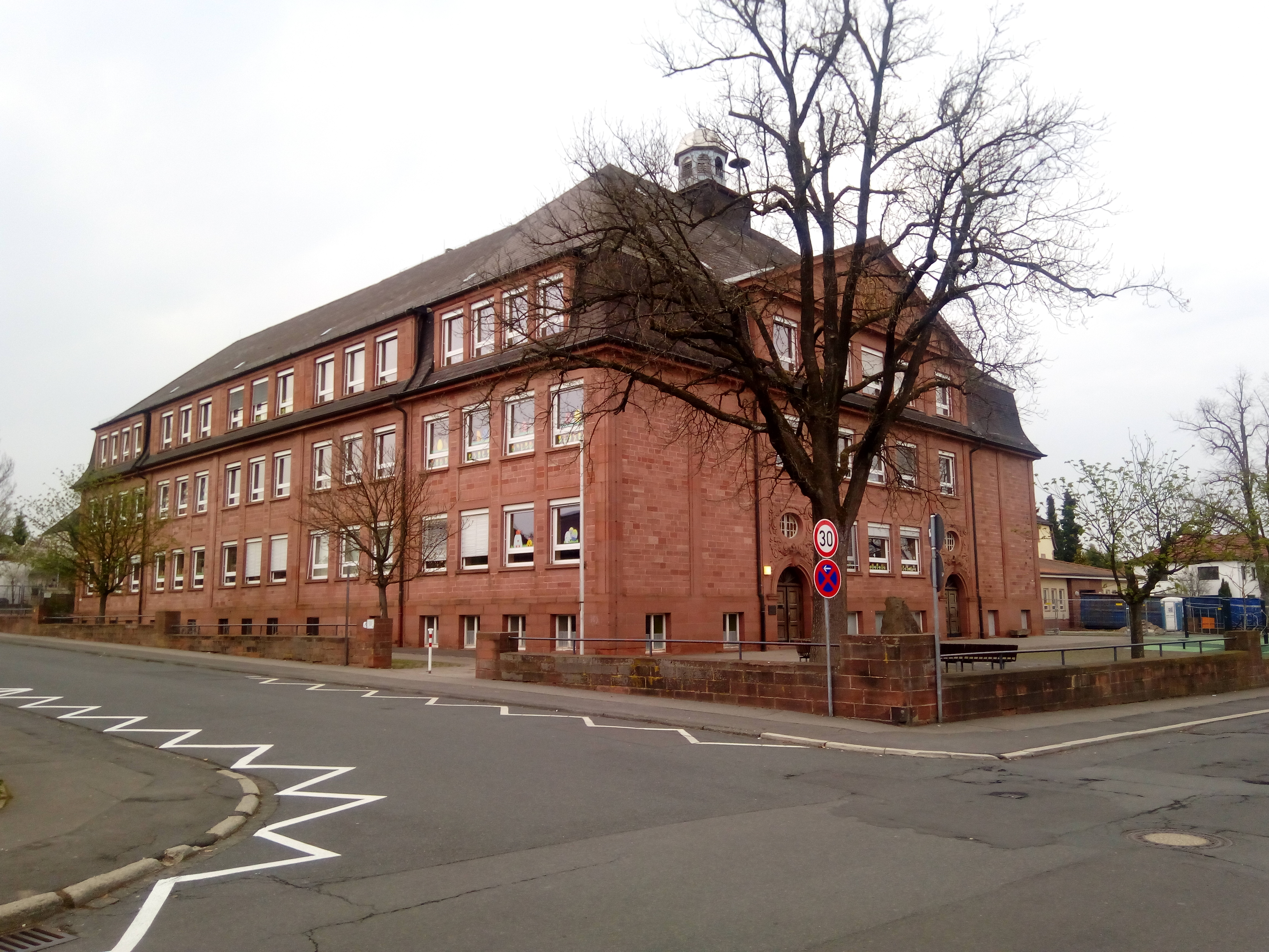 Walldürn hist. Schulgebäude, heute Grundschule, in der vorderen Mauerecke Gedenkstein für die Opfer des Bombenangriffs vom 21. Juli 1944